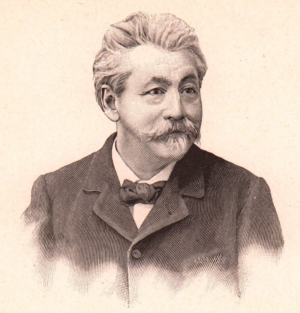 French historian Frédéric Masson (1847-1923)